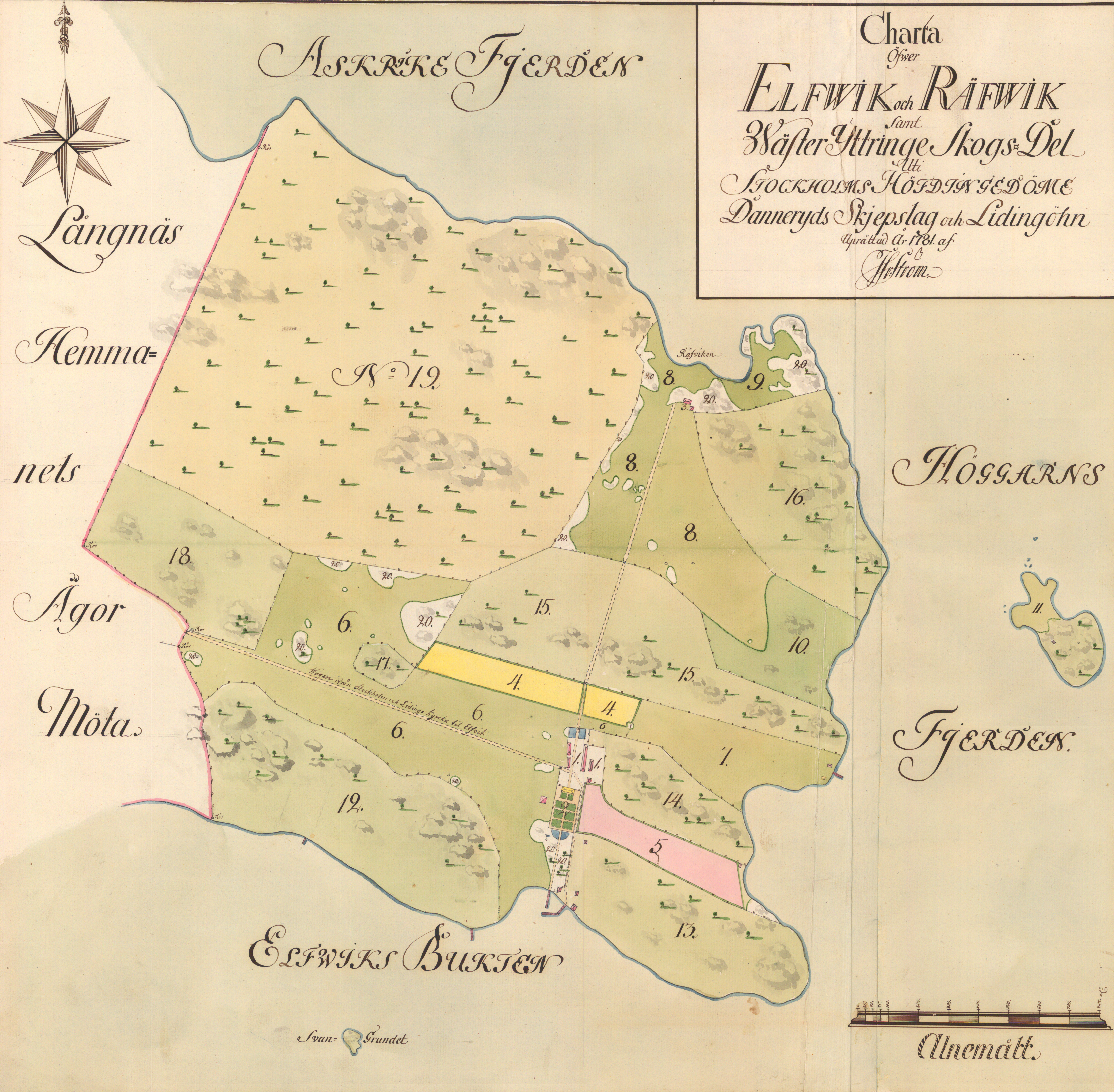 Elviks gård lantbruksfastighet från en uppmätning 1781 av lantmätare Israel Ström.